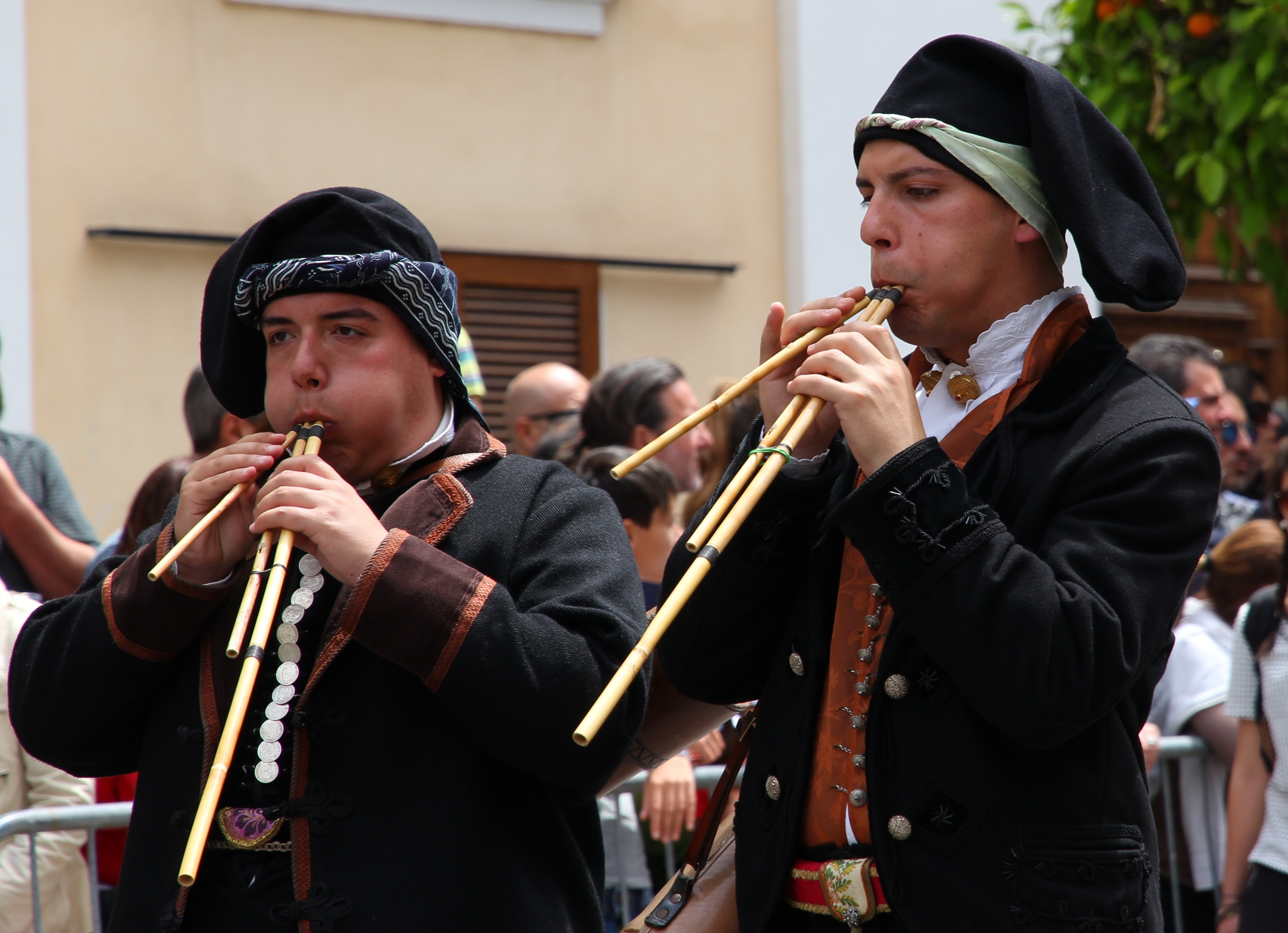 Costume tradizionale